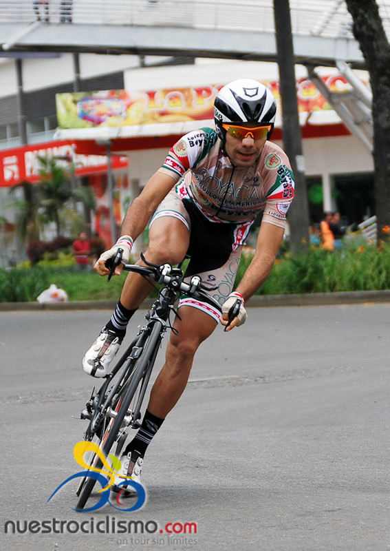 Jeffry Romero en la Vuelta de la Juventud 2011